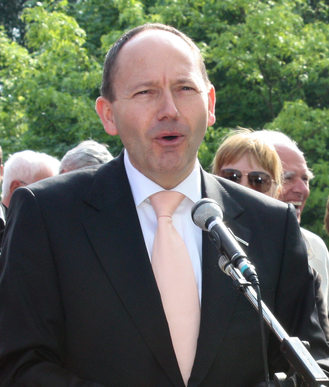 3. Europatreffen historischer Omnibusse: Christian Specht